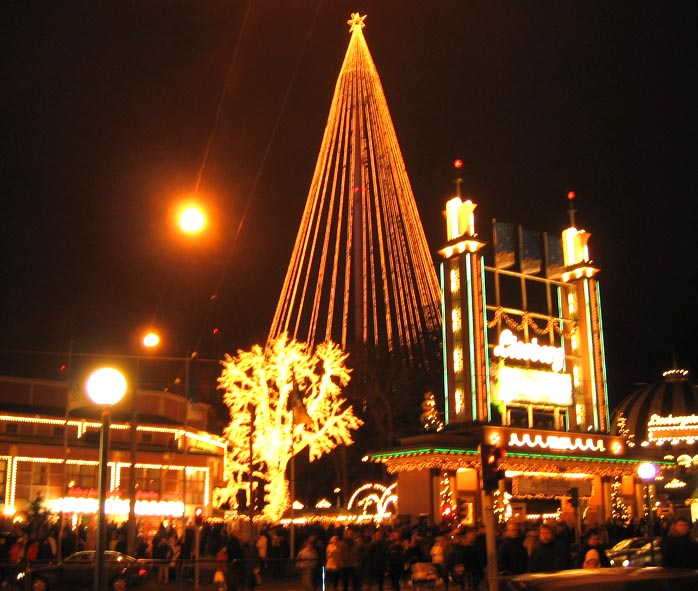 Liseberg på vintern Foto: Philippe